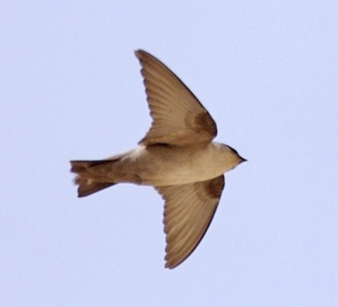 Pale Crag Martin Ptyonoprogne obsoleta, Cairo, Egypt